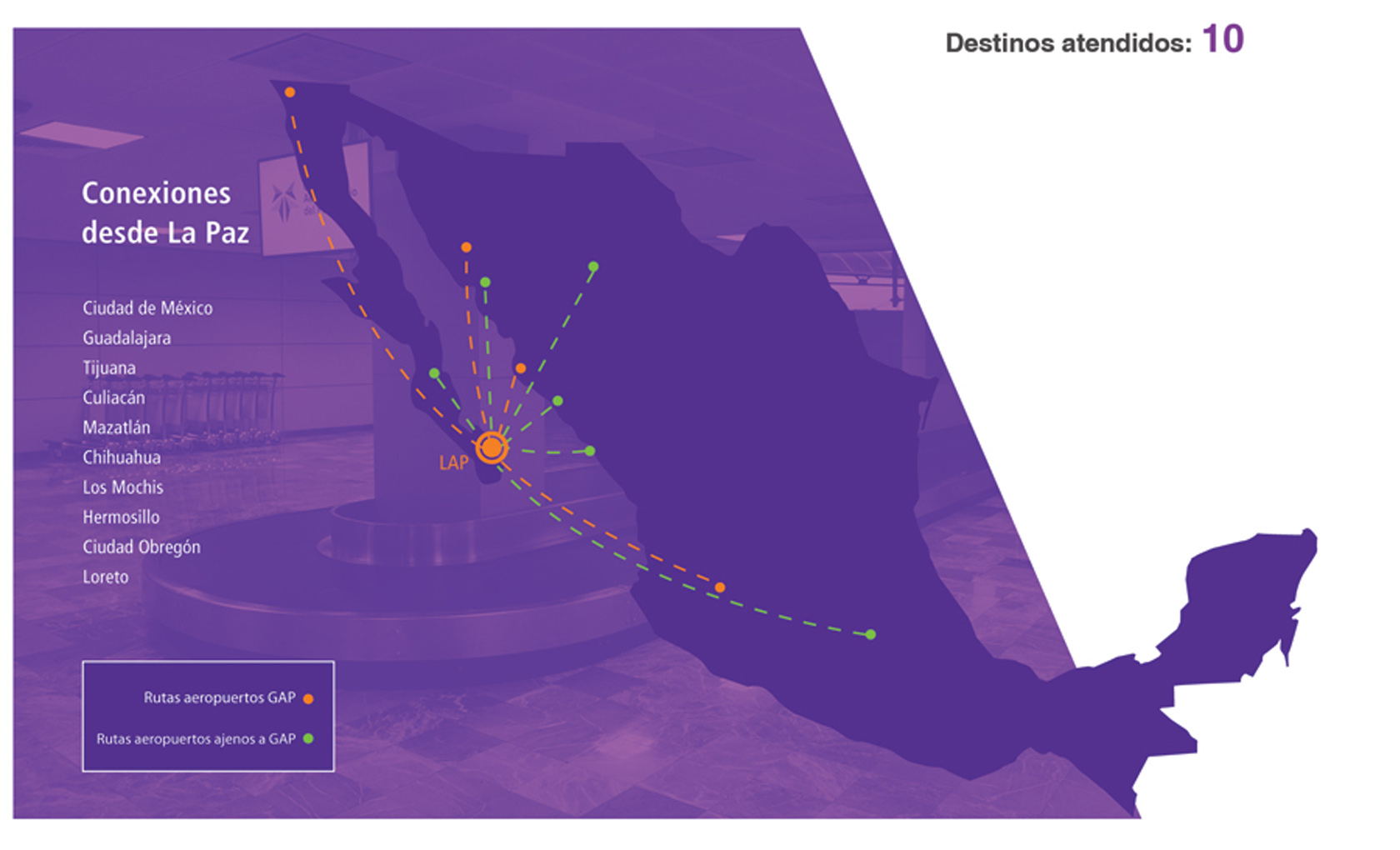 Destinos La Paz